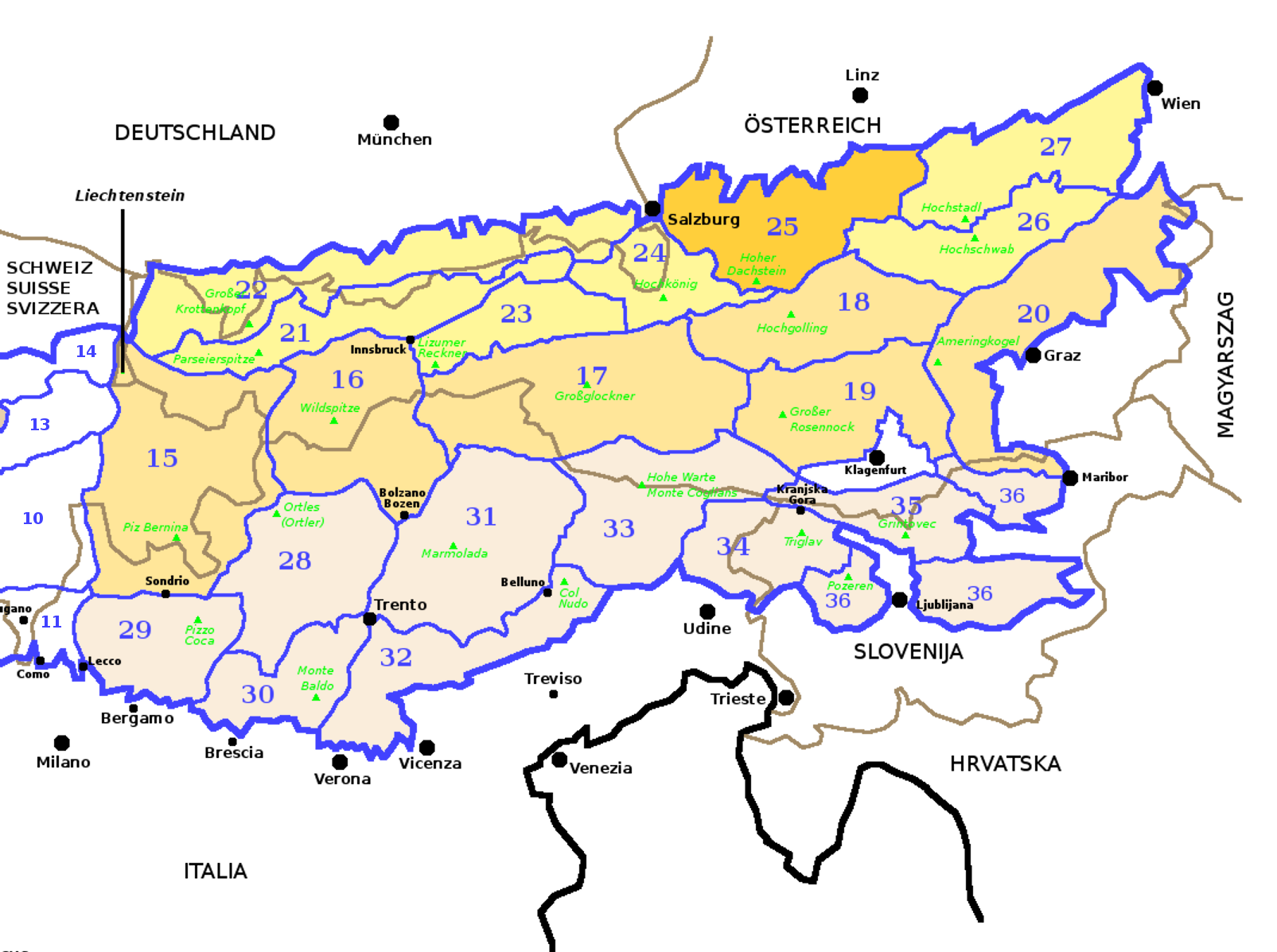 Alpi Orientali secondo la SOIUSA con evidenziate le Alpi del Salzkammergut e dell'Alta Austria